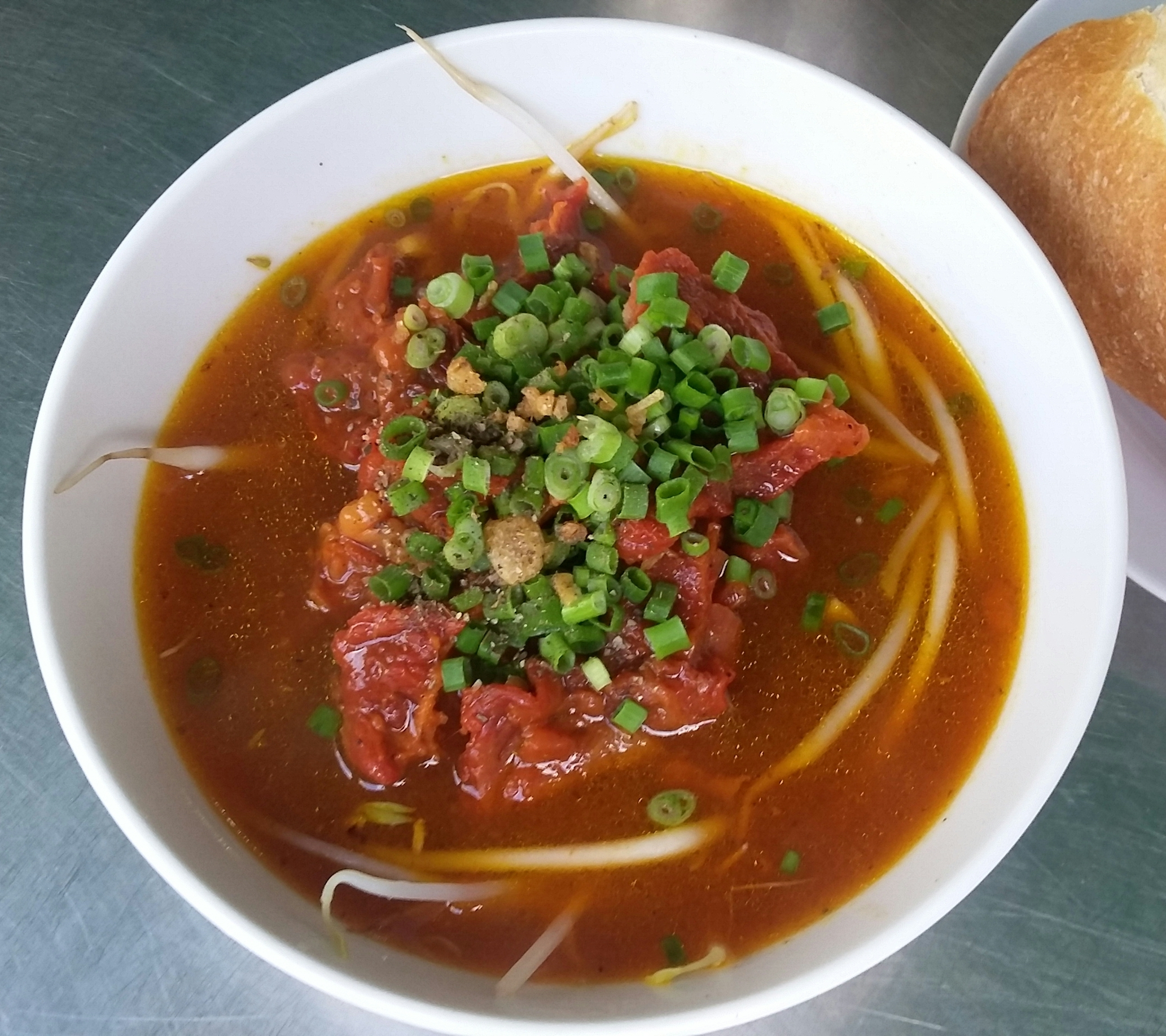 Món bò kho Phú Yên, hình chụp bằng máy điện thoại di động rồi up lên để minh họa cho bài viết